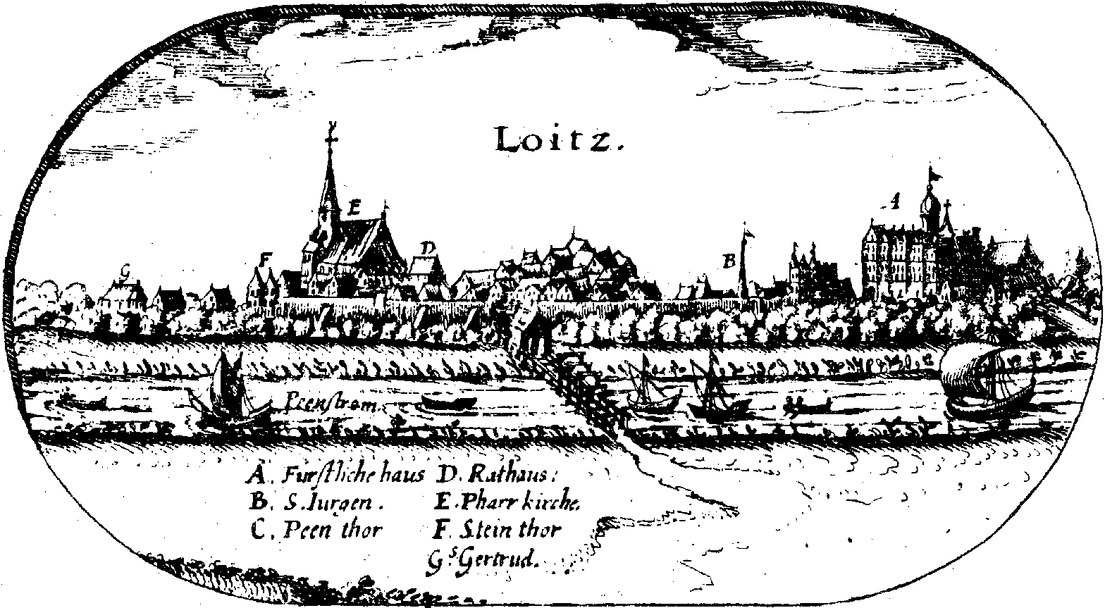 Ansicht von Loitz (zwischen 1614 und 1617)